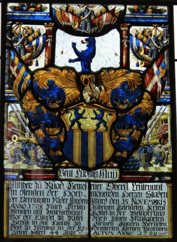 Wappenscheibe